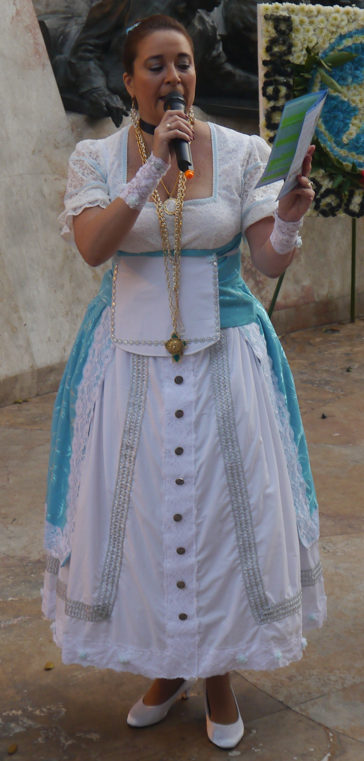 Poetisa Karina Gálvez usando una representación del faldellín guayaquileño de finales del siglo XVIII